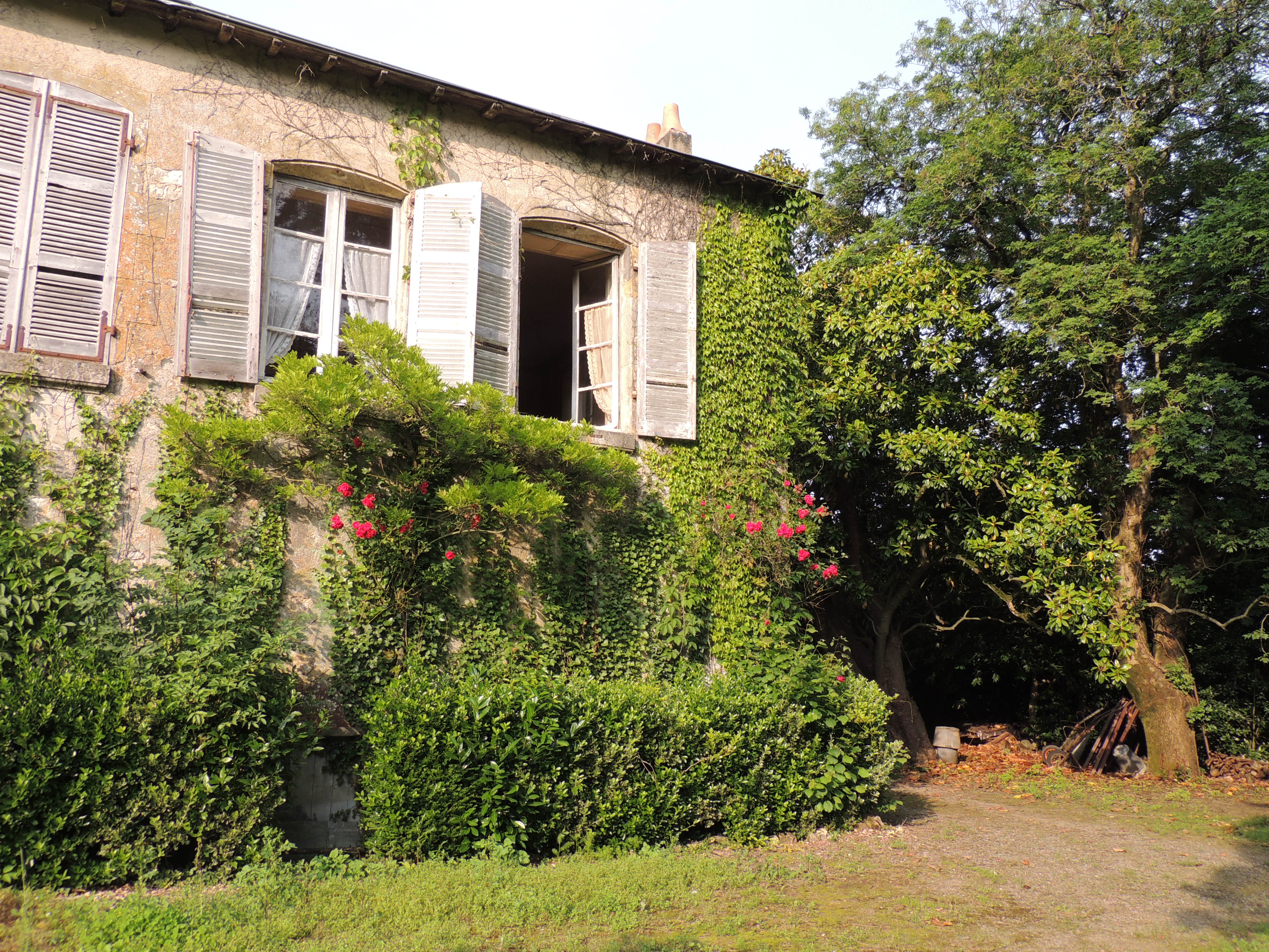 Château du bourg - Façade côté droit